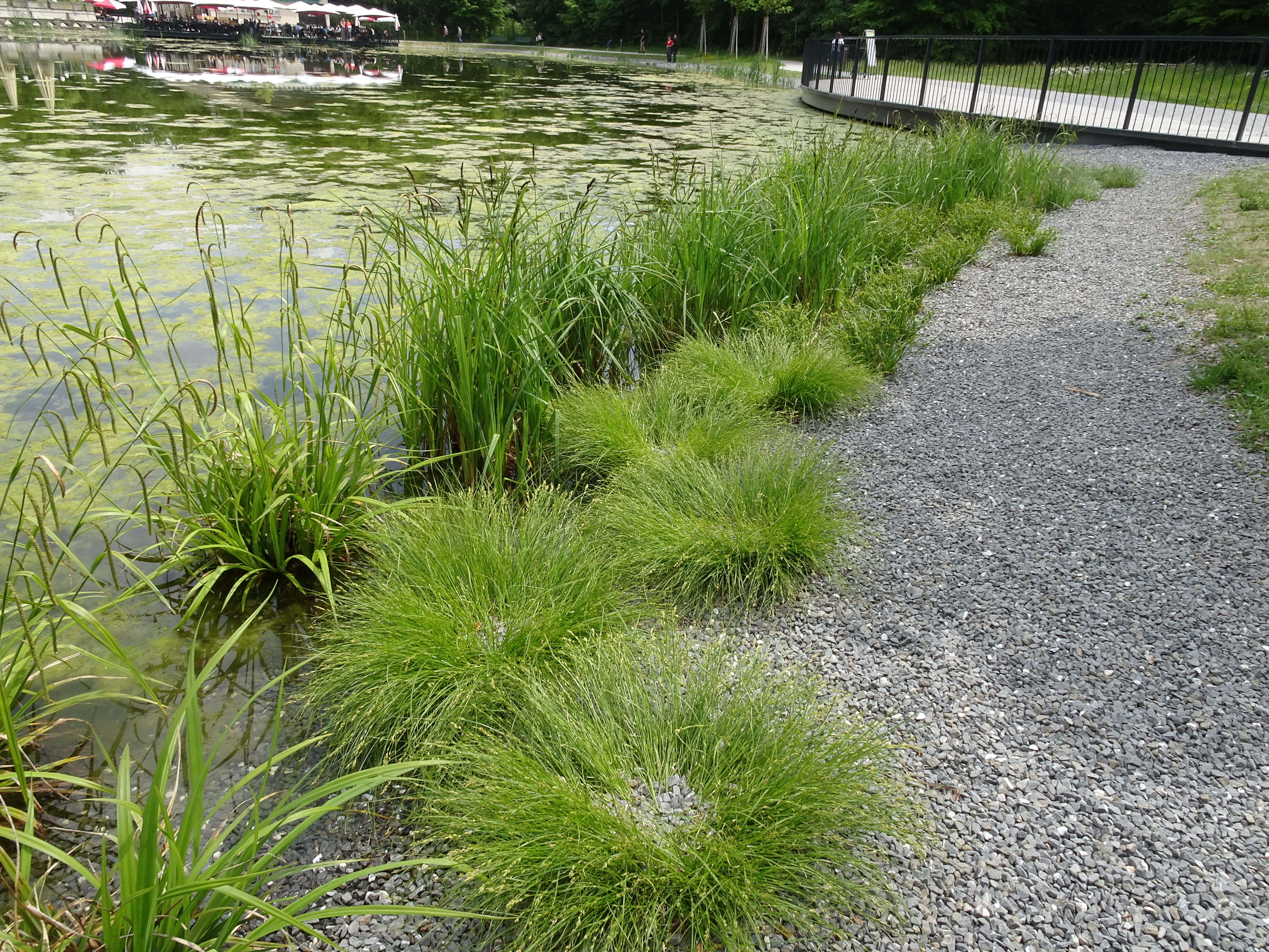 Lac de Sauvabelin, Lausanne, Šveits. Kaldavööndisse graniitkillustiku sisse istutatud tarnapuhmad, kokku seitsmest liigist.